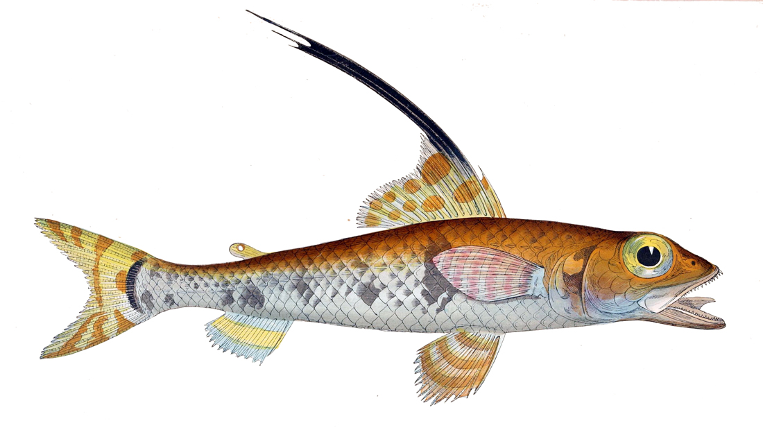 Aulopus filamentosus